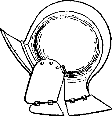 Бургіньёт перыяду сярэдзіны 16 ст.